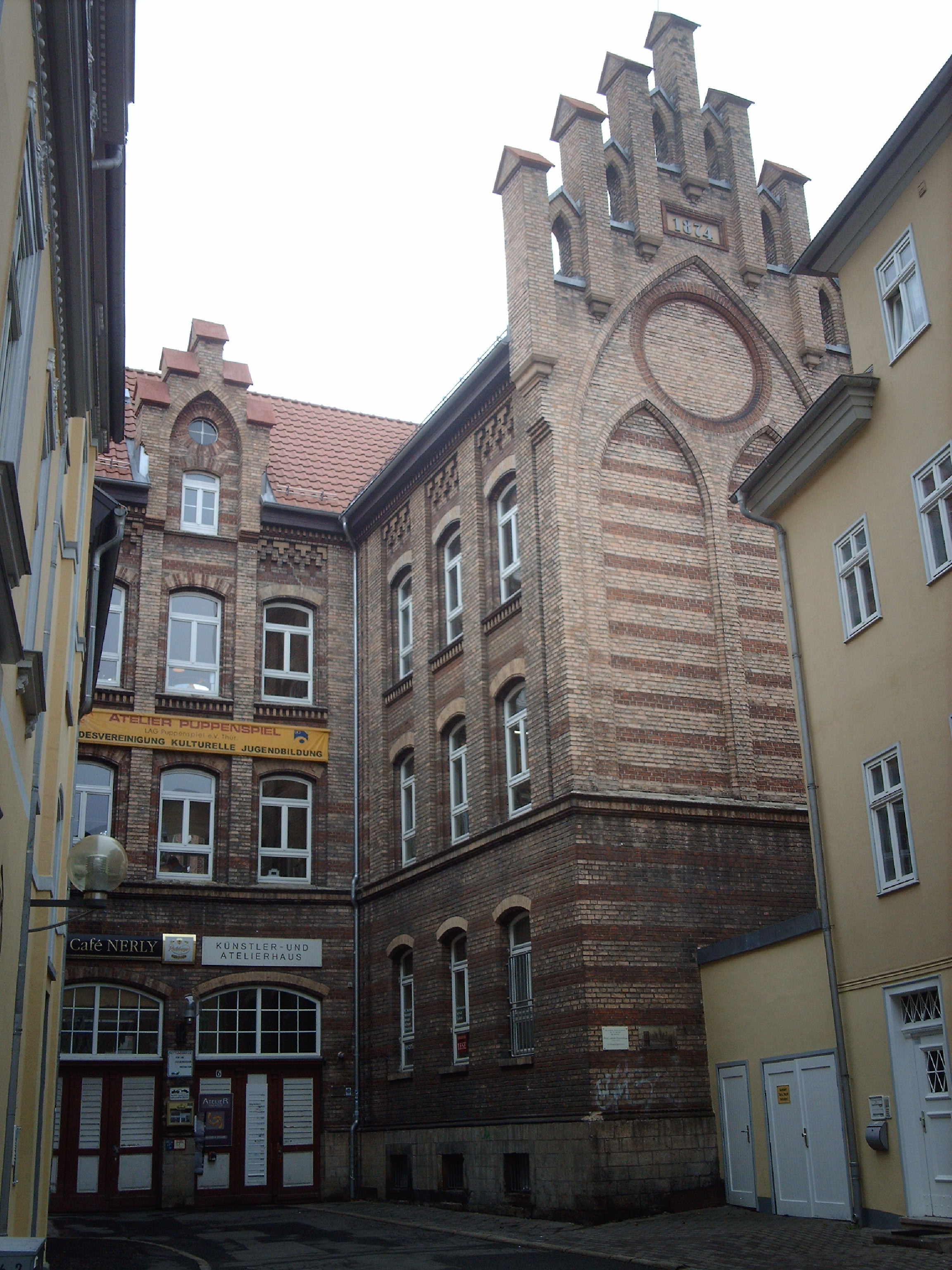 Ehem. Schule Zur Himmelspforte in der Markstraße 6 in Erfurt.